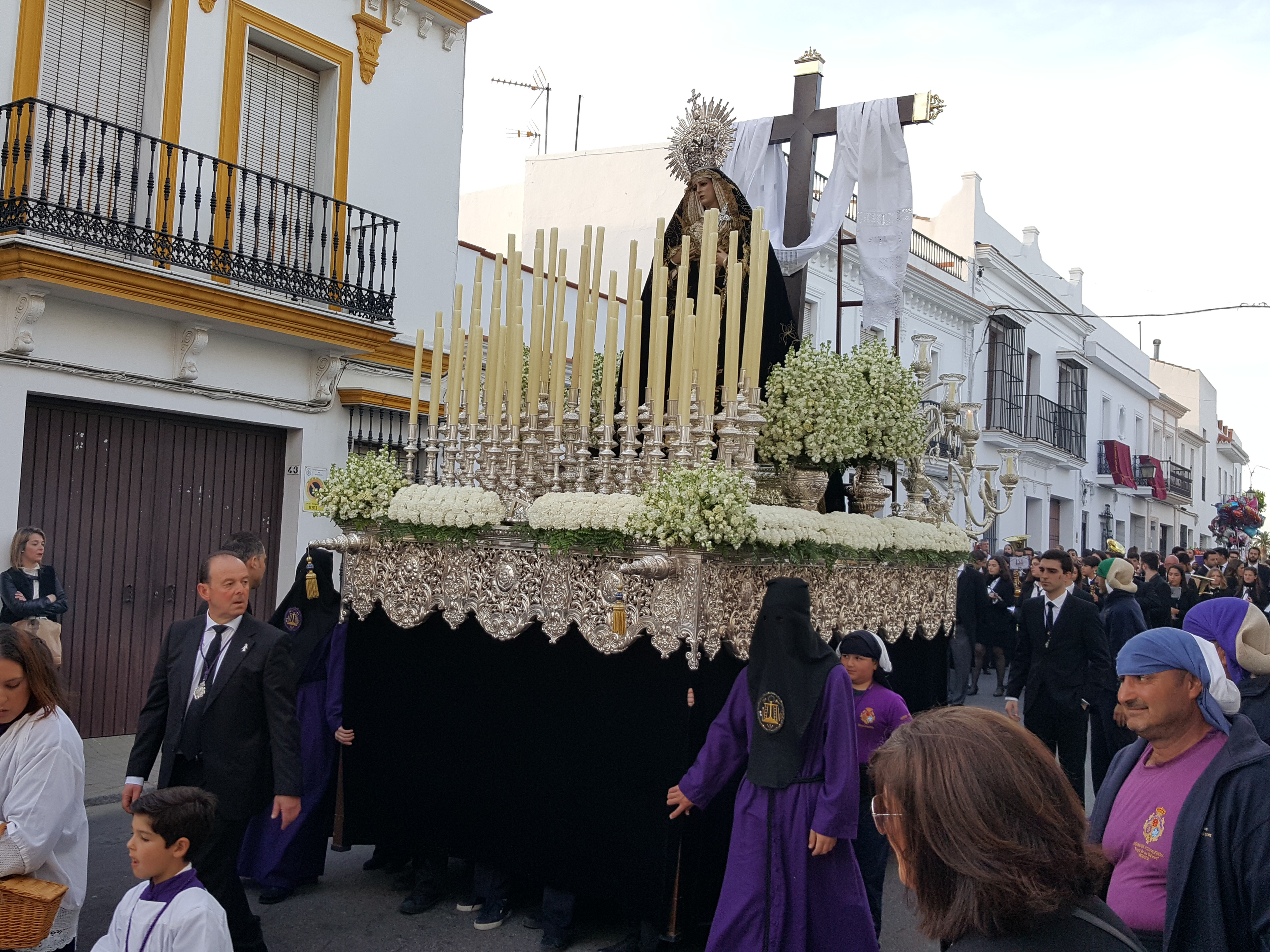 Hermandad del Santo Entierro. Desfile procesional del Sábado Santo. Vista de paso de la Virgen de la Encarnación por el casco urbano de Moguer.